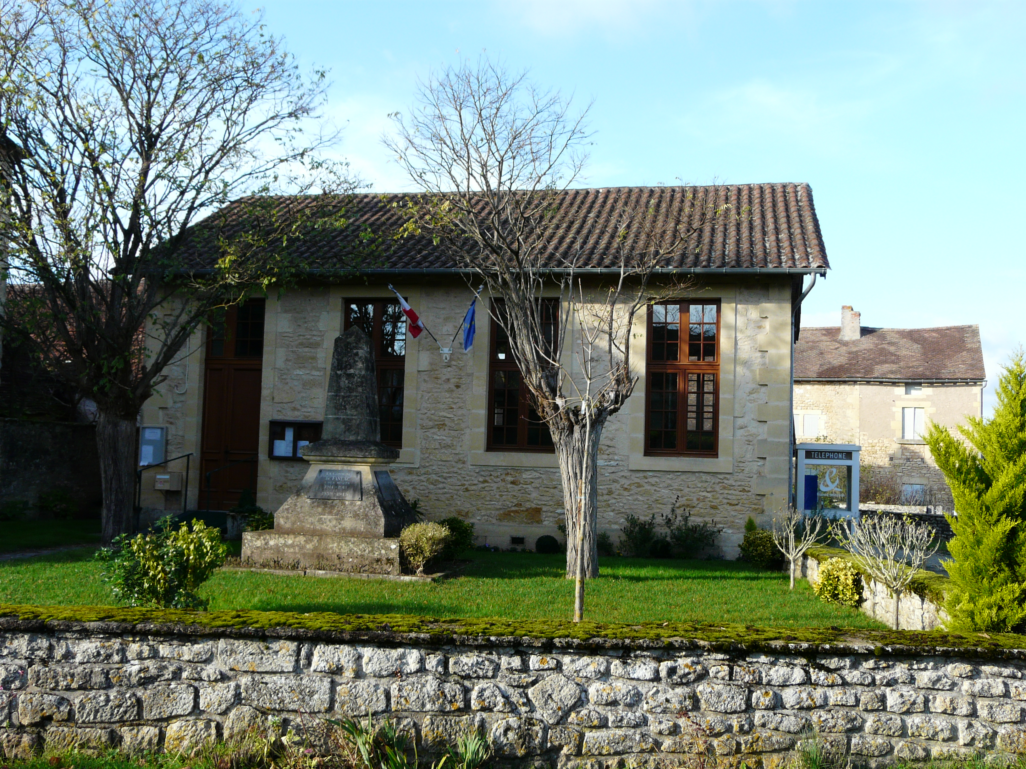 La mairie de Fanlac, Dordogne, France.